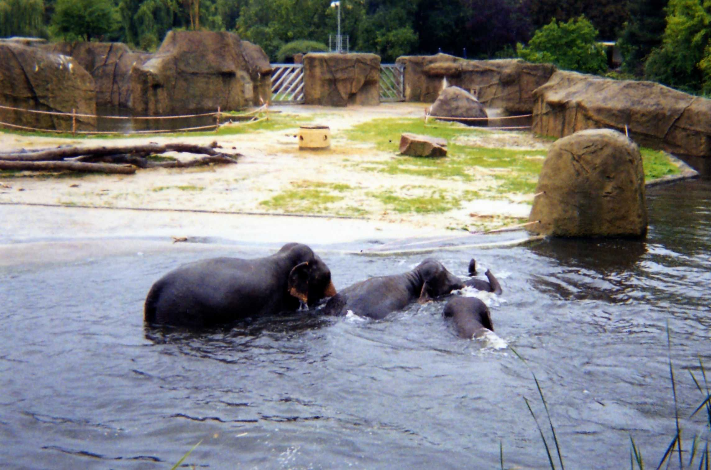 elephant du zoo de cologne